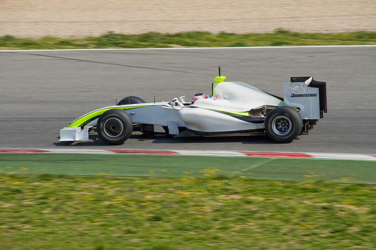 Nikon D90 + Sigma 18-200 DC OS HSM 1/400s - F/13 - 200mm - ISO200